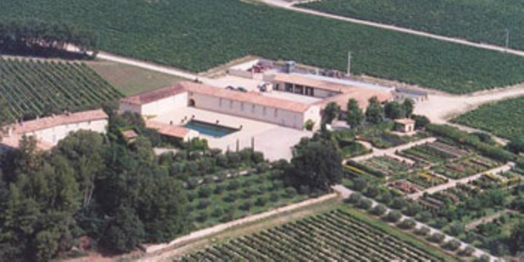 Val Joanis vu d'avion